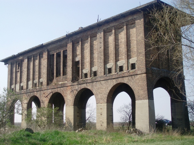 Ehemalige Kohlebeschickungsanlage Gemeinde Röcken, Stadt Lützen